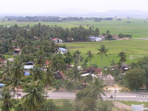 photo prise par--flayais 23 oct 2004 à 05:20 (CEST) sept2004